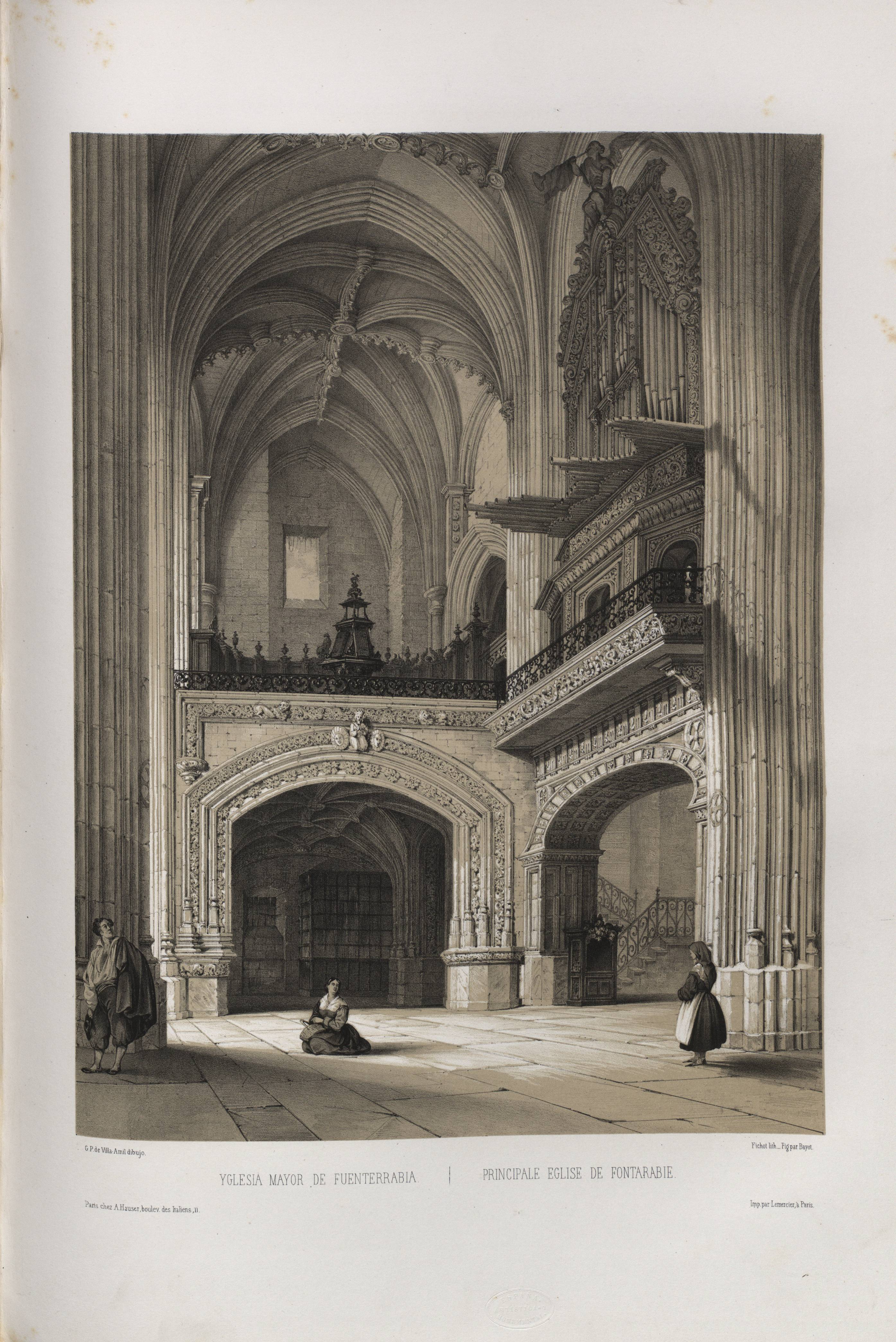 Iglesia mayor de Fuenterrabía.